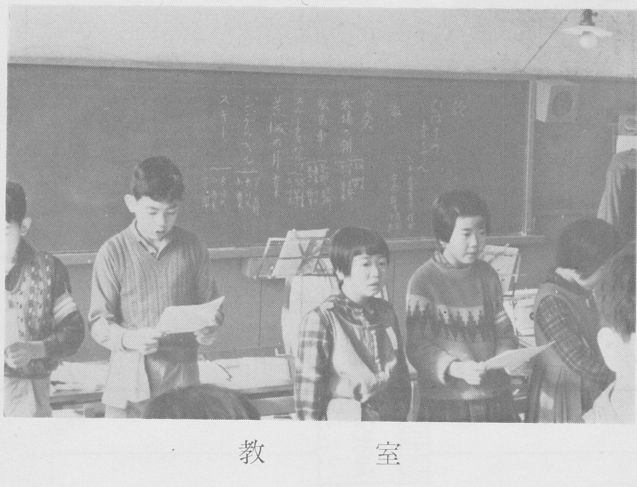 昭和44年当時の同学園内での光景